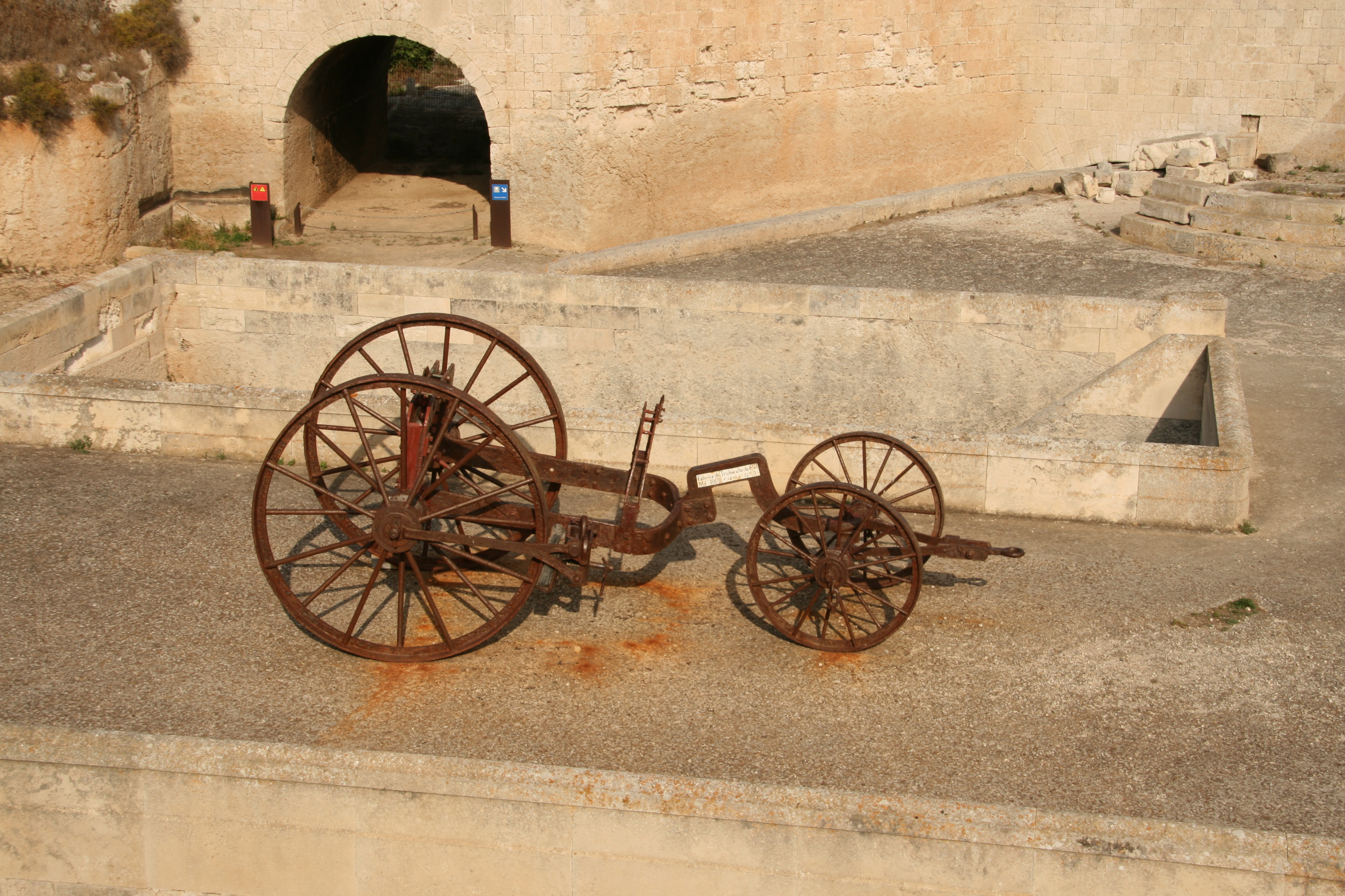 Trinquival fabricado en 1871 en Trubia (tenía por objeto transportar piezas de artillería pesadas y voluminosas. Está situada junto a la entrada a las galerías subterráneas de la fortaleza de Isabel II o de La Mola, en Menorca